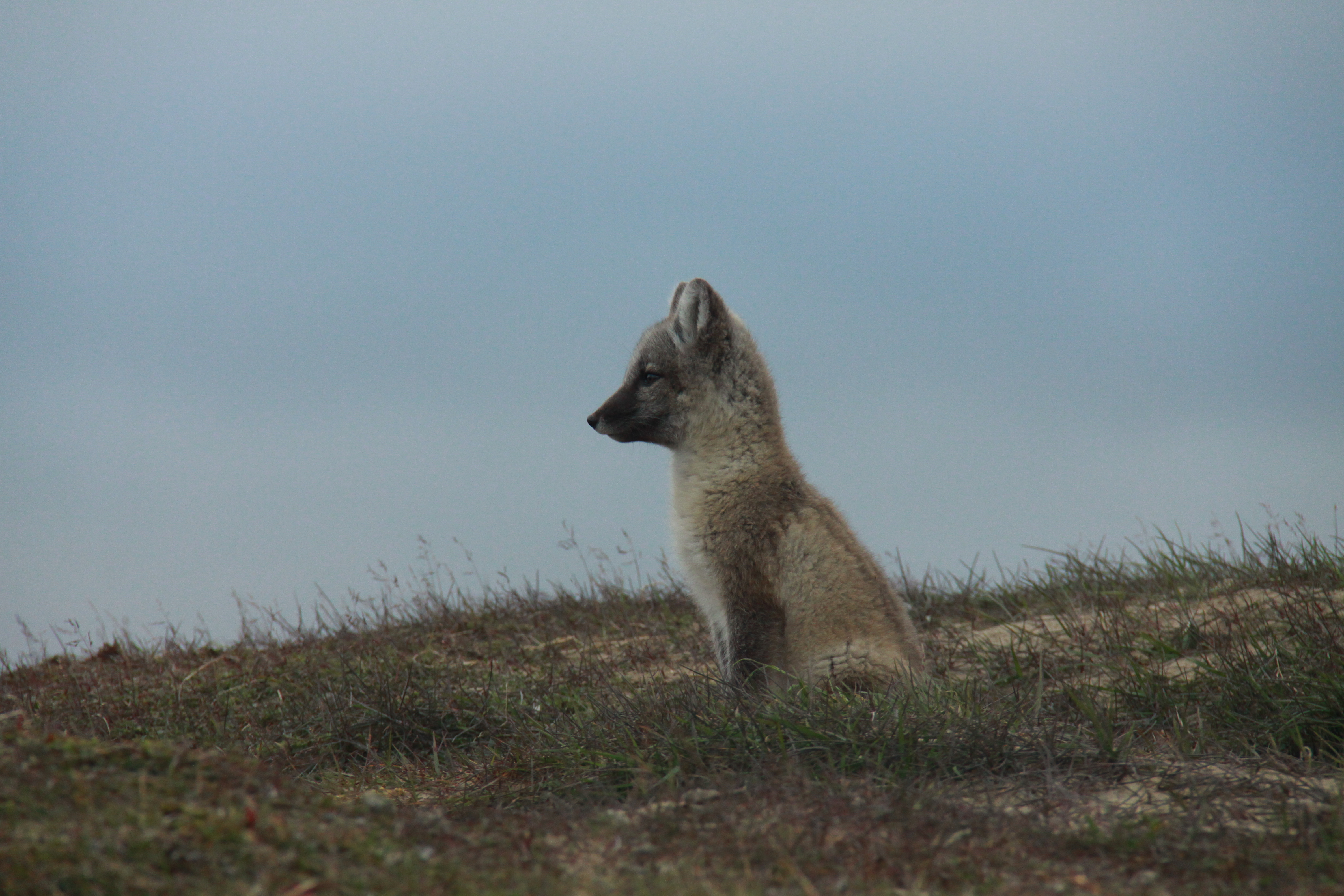 Заповедник Гыданский: Тазовский район, Ямало-Ненецкий автономный округ This image is related to the protected area of Russia number 8900014